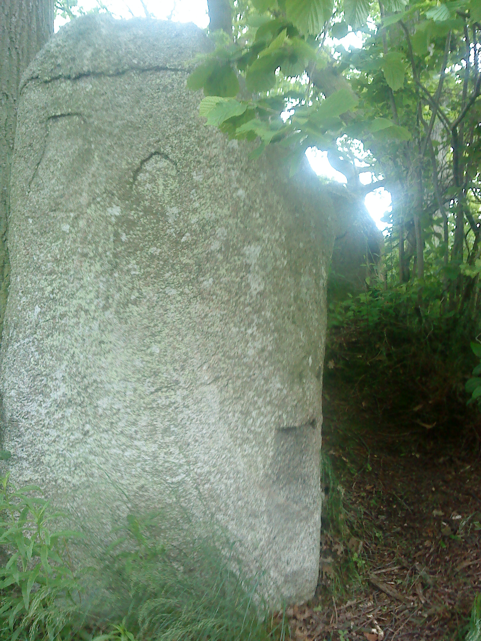 Wächterstein vor Hünenbett2, Lancken-Granitz